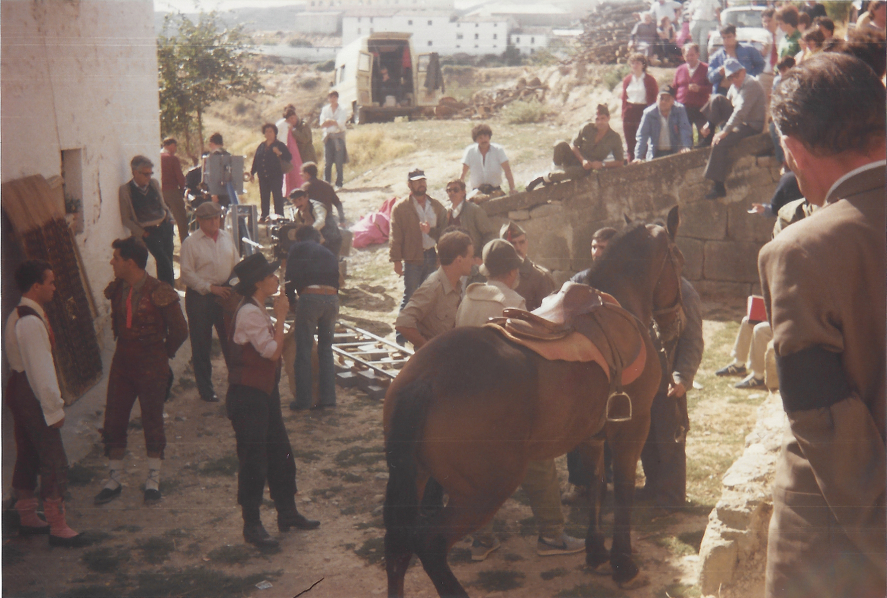 Rodatge de La Vaquilla, de Luis G. Berlanga, estiu de 1984, Sos del Rei Catòlic.